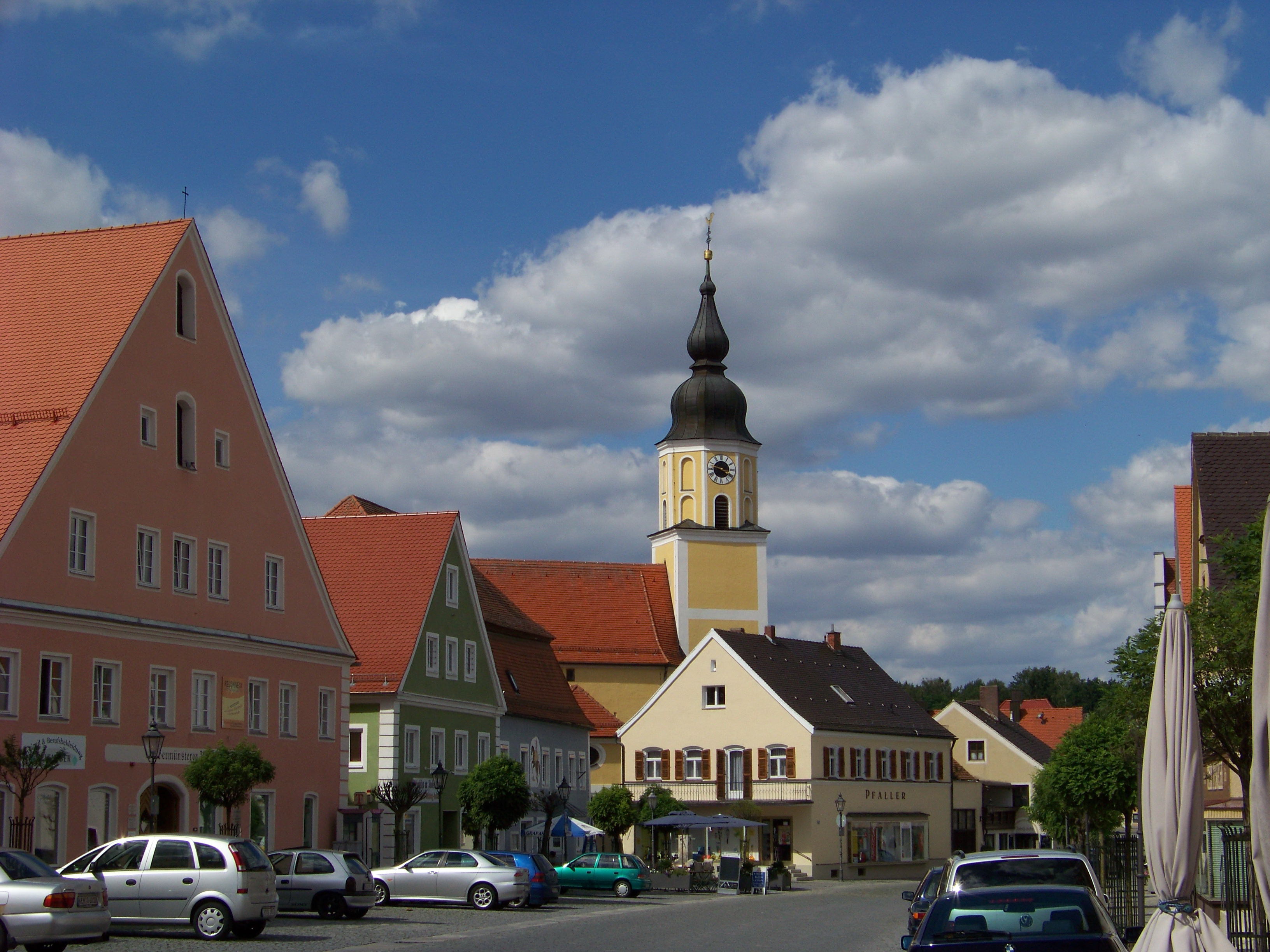 Langquaid Marktplatz 14. Katholische Pfarrkirche St. Jakob d. Ä. Saalkirche mit Steildach, eingezogenem Rechteckchor und Chorscheitelturm, Portalvorhalle nach Süden, Chor und Turm im Kern romanisch, 13. Jahrhundert, Langhaus spätgotisch, 15. Jahrhundert, Barockisierung der Anlage um 1740, Verlängerung nach Westen, 1917.